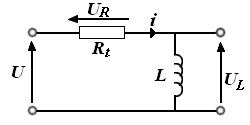 Circuit dipole RL série